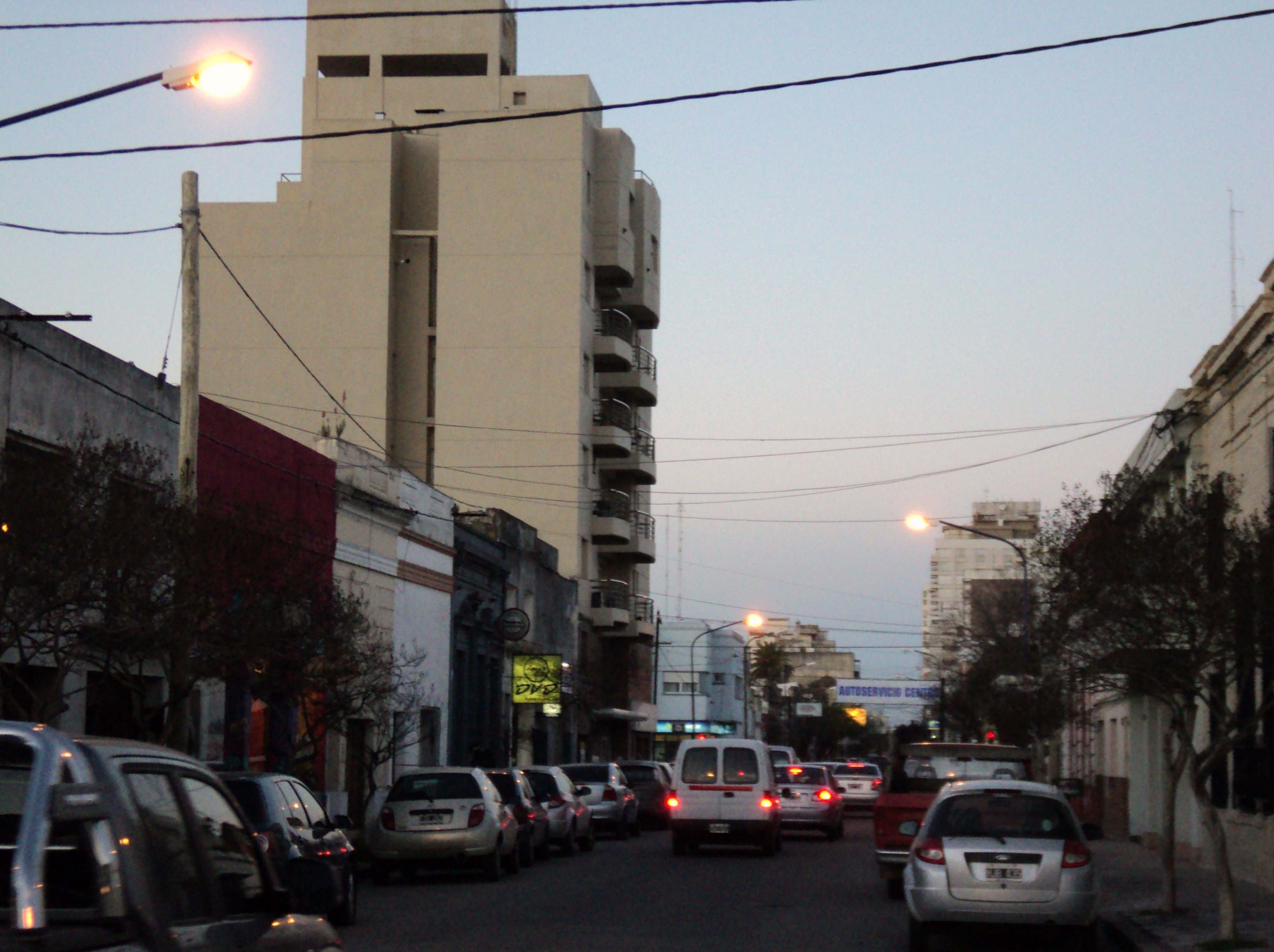 parte del centro de la ciudad de azul